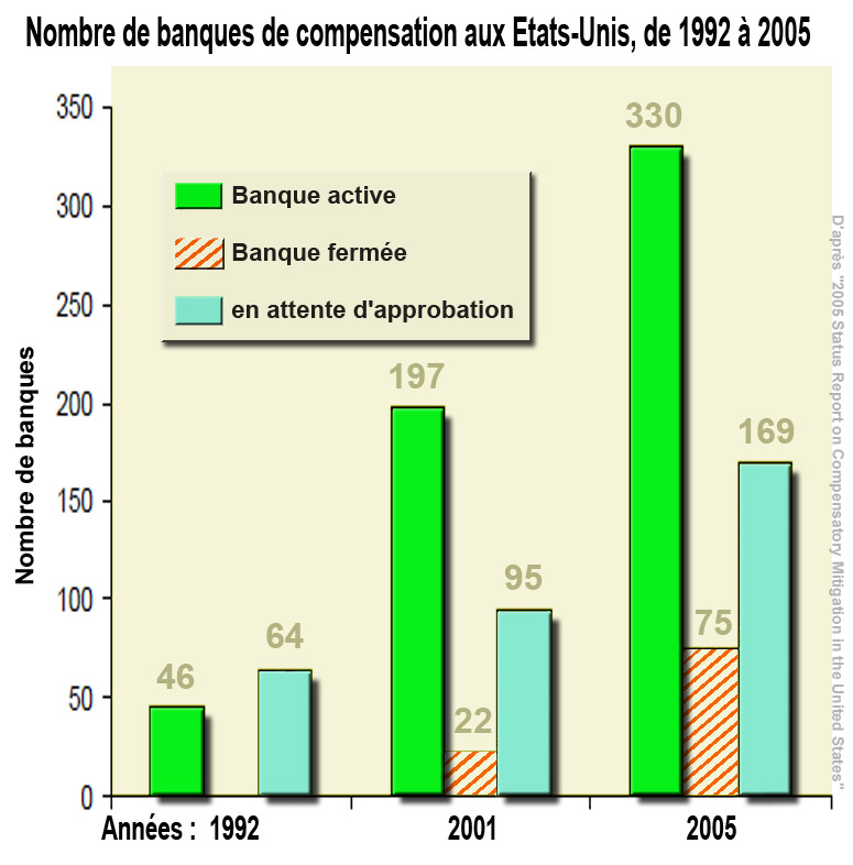 Statistiques sur les banques de compensation aux Etats-Unis Source : 2005 Status Report on Compensatory Mitigation in the United States ; An ELI Report Jessica Wilkinson and Jared Thompson April, 2006